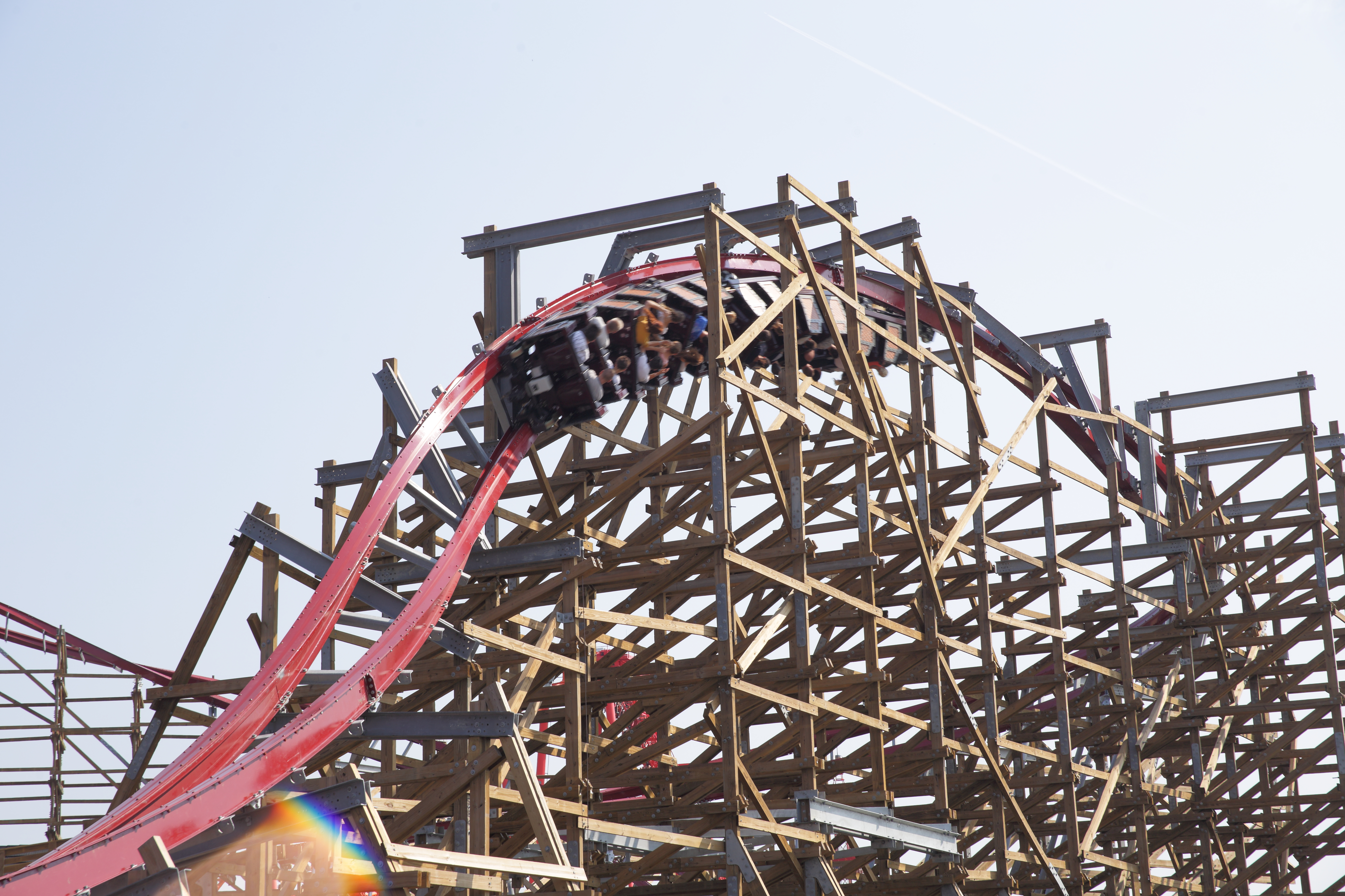 Zero-g-roll - trzecia inwersja na hybrydowej kolejce górskiej Zadra w parku Energylandia w Polsce.